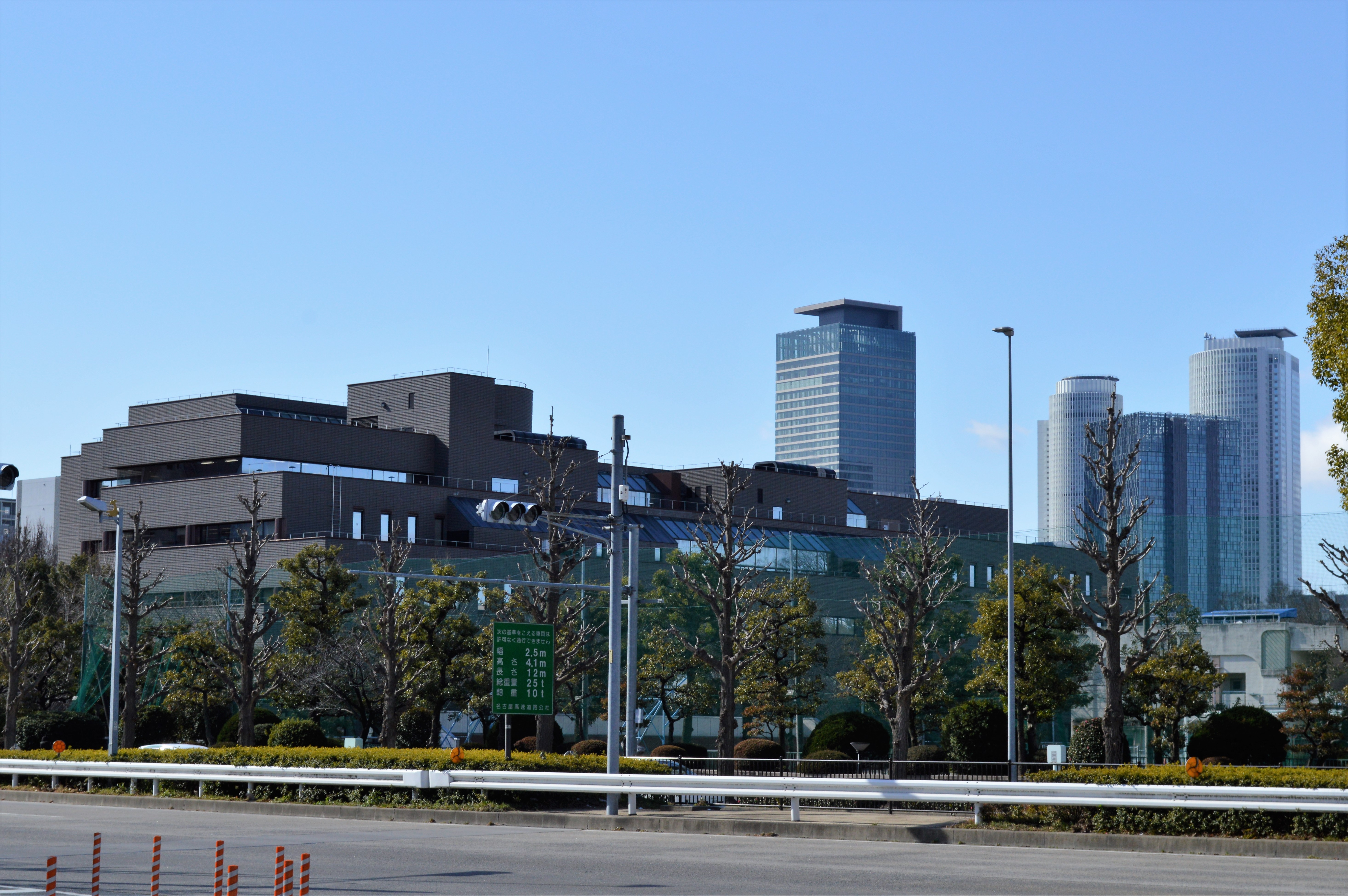 愛知県図書館（左側半分）、ミッドランドスクエア（中央右寄り）、JRセントラルタワーズ（右端）。